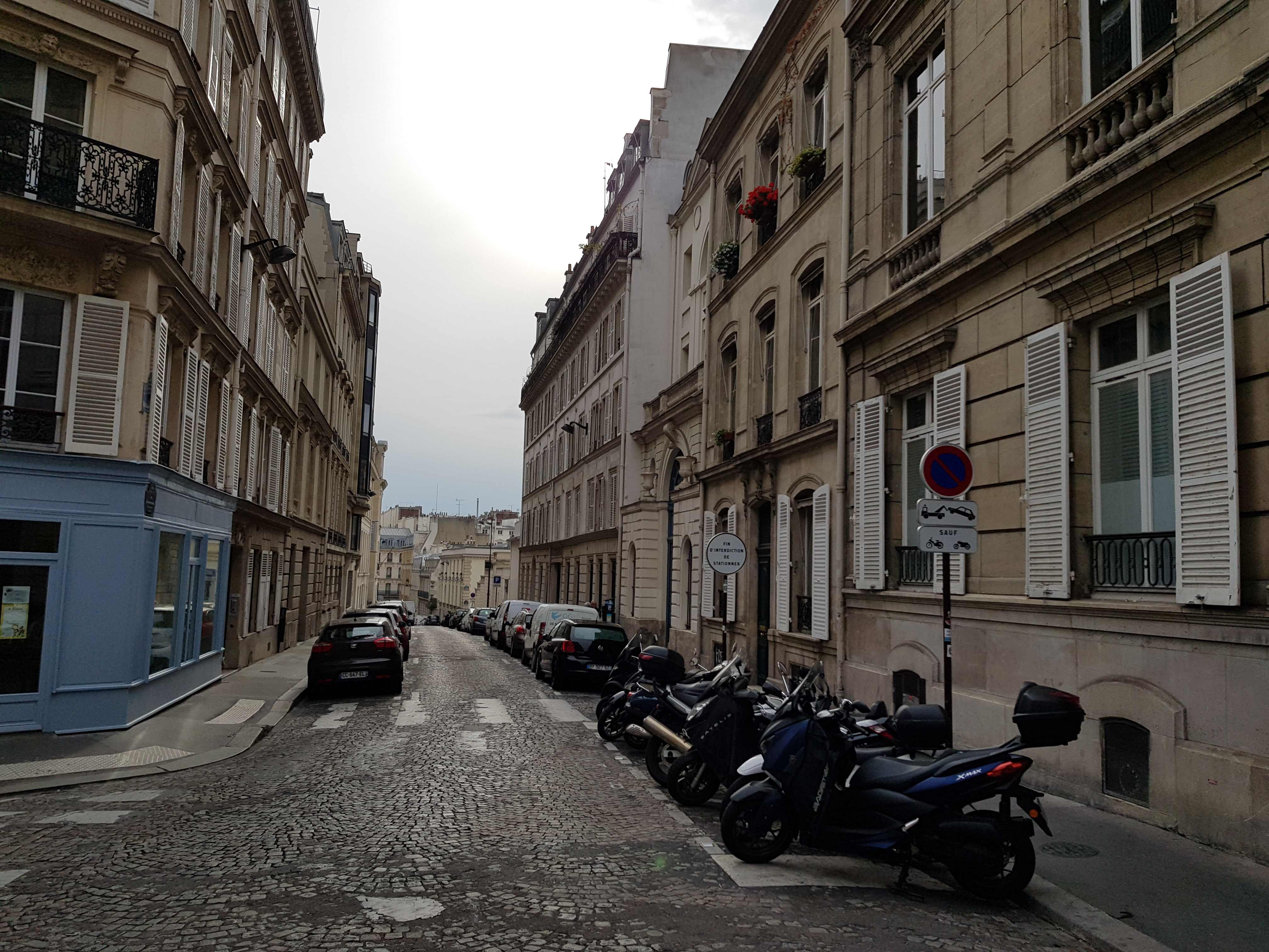 Rue de La Rochefoucauld, Paris 9e.